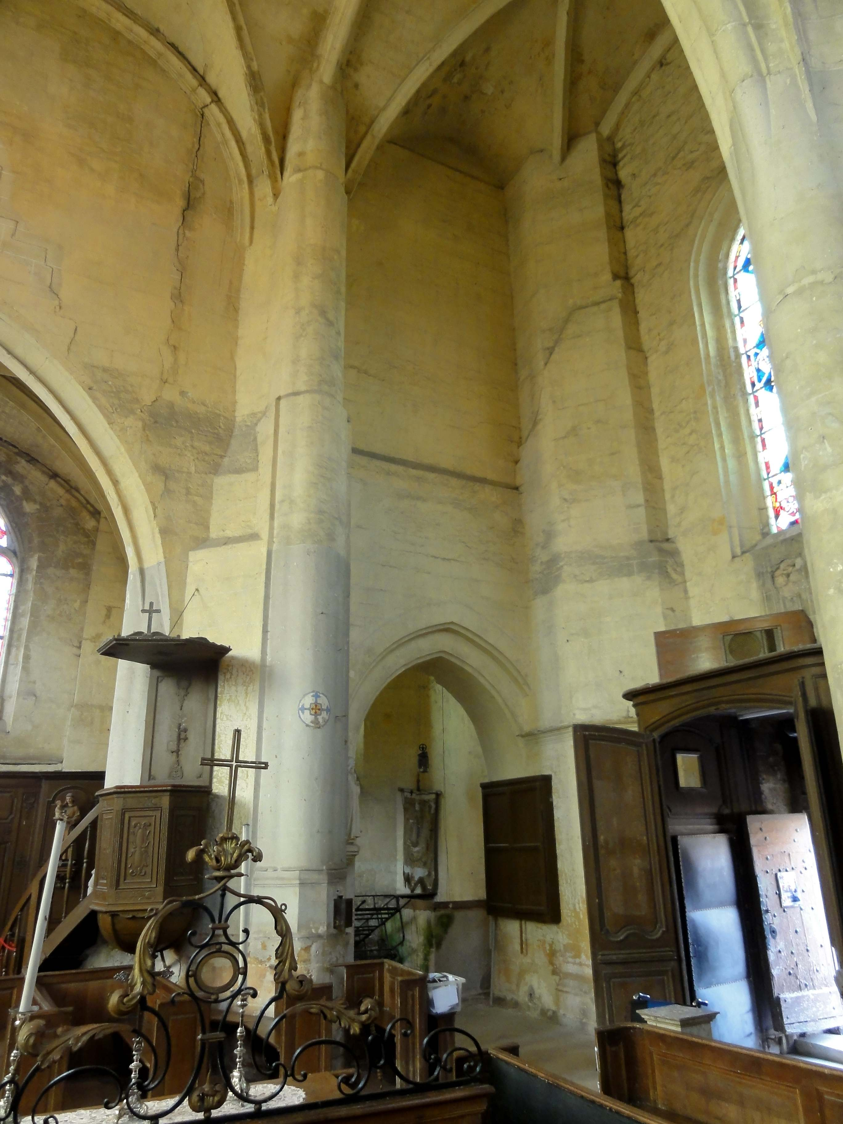 Intérieur de l'église Saint-Martin de Versigny (voir titre).